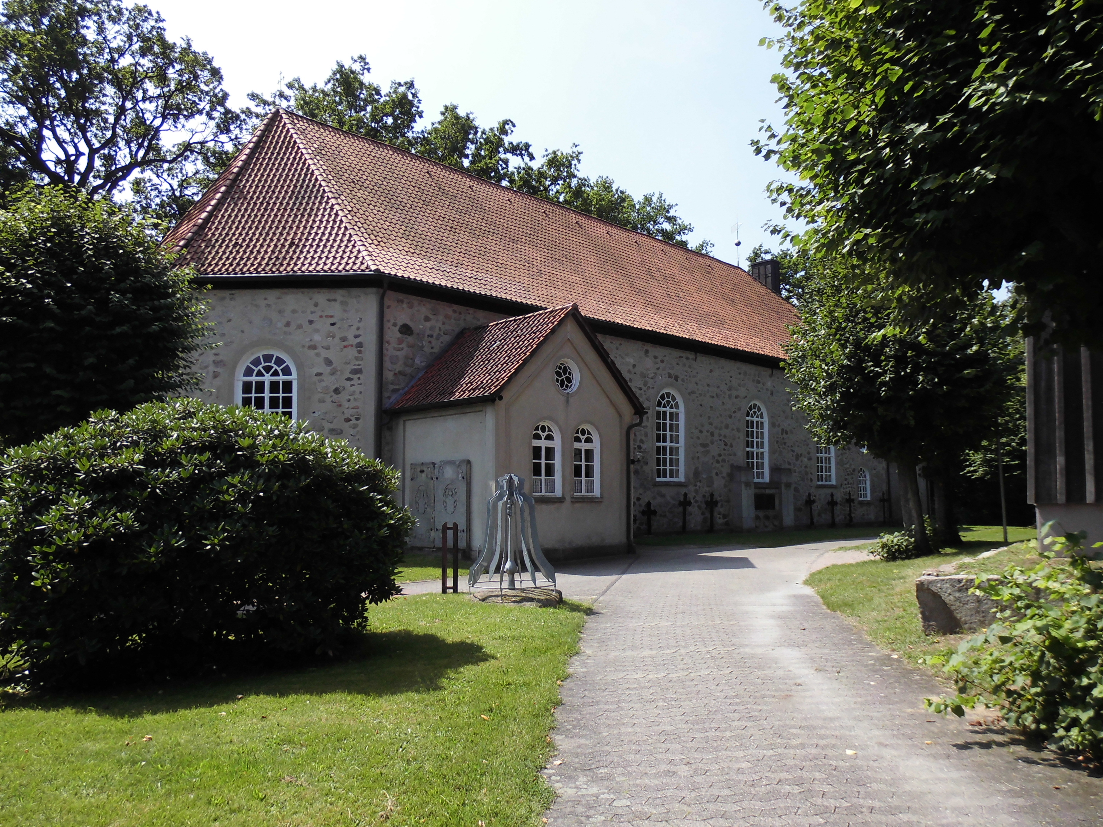 St.-Martinskirche in Dorfmark, Landkreis Heidekreis